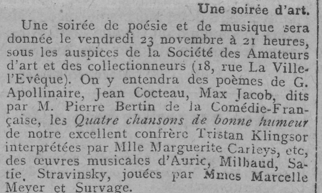 Marcelle Meyer en concert